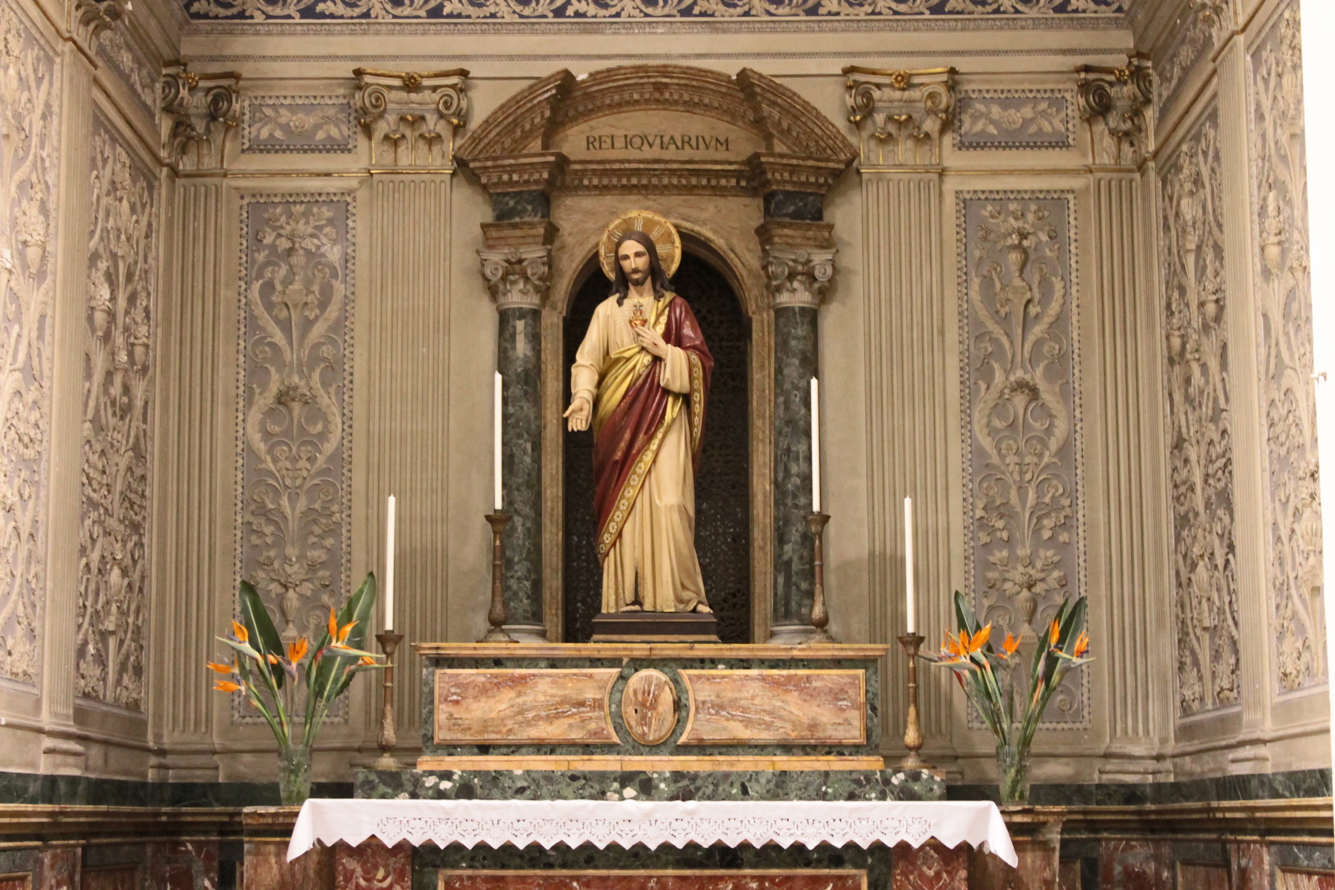 Ex cattedrale dedicata a Santa maria La Cava e i fratelli Alfio, Filadelfo e Cirino, patroni e protettori della città di Lentini. La chiesa ha origine nel periodo paleocristiano, come testimonia la presenza al suo interno, nella navata destra, un complesso di tre arcosoli, scavati nella roccia, luogo di sepoltura dei 3 fratelli. L'attuale chiesa venne costruita dopo il terremoto del 1693 ed ultimata nel 1750. La facciata è di stile tardo barocco, finemente decorata, mentre al suo interno e ricca di decorazioni in stucco, affreschi, tele del XVII-XVIII secolo e molti altri reperti ed opere.